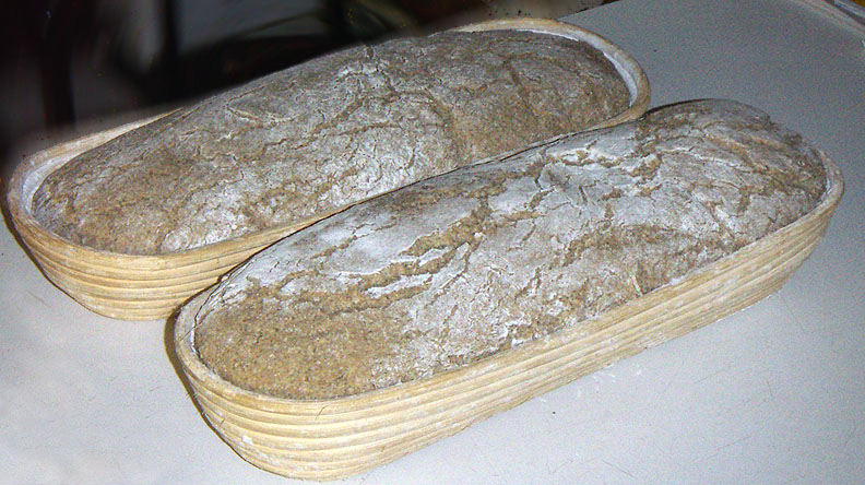 Gärkörbchen mit angesetztem brot, fertig